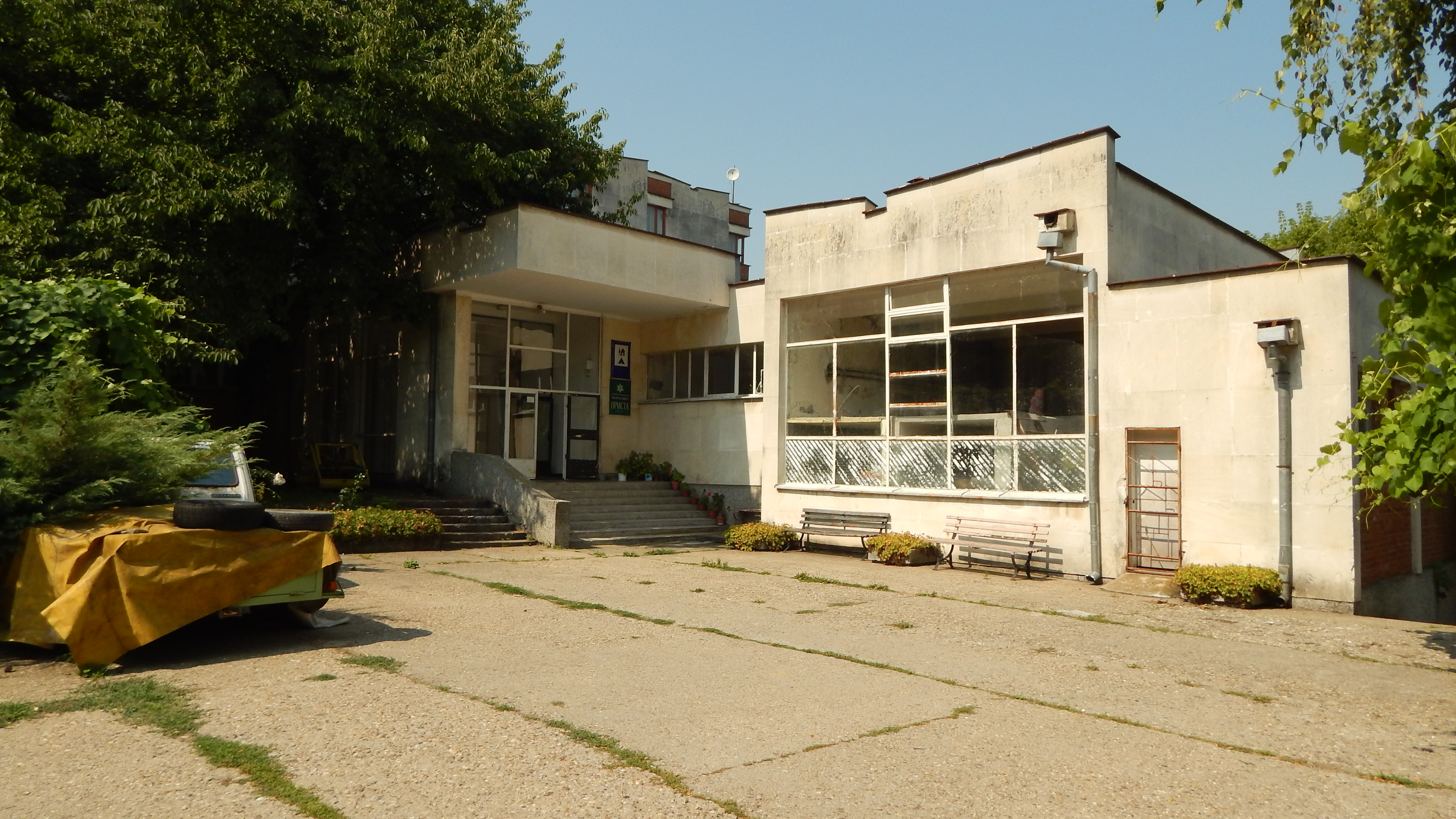 Китка